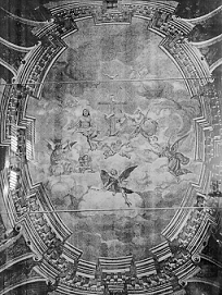 Particolare della volta a botte come appariva in un'immagine che risale approssimativamente agli anni 20 e tratta da una mia vecchia rivista in pessimo stato e ridotta a poche pagine. Non è possibile risalire al momento originario dello scatto, che potrebbe essere relativo al periodo precedente la prima ricostruzione, quindi con l'affresco originale.